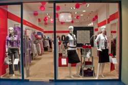 Изображение магазина Woolstreet.